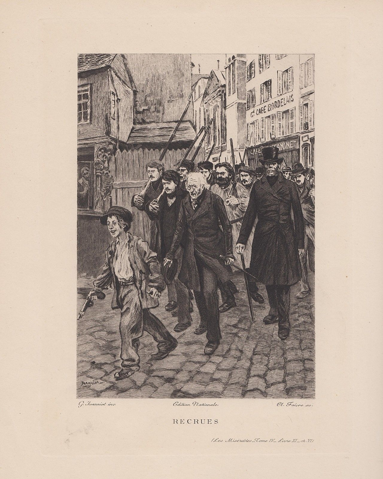 Recrues : Gavroche et le père Mabeuf en tête des insurgés. Javert, incognito, les suit de près. Gravure d'Abel Faivre d'après un dessin de Pierre Georges Jeanniot pour Les Misérables de Victor Hugo, tome IV, livre onzième, chapitre 6.